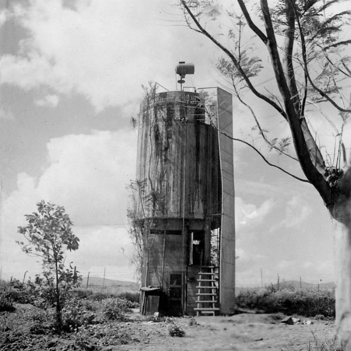 הסולם במגדל המים בטירת צבי מוסווה בבד יוטה לצרכי ביטחון.